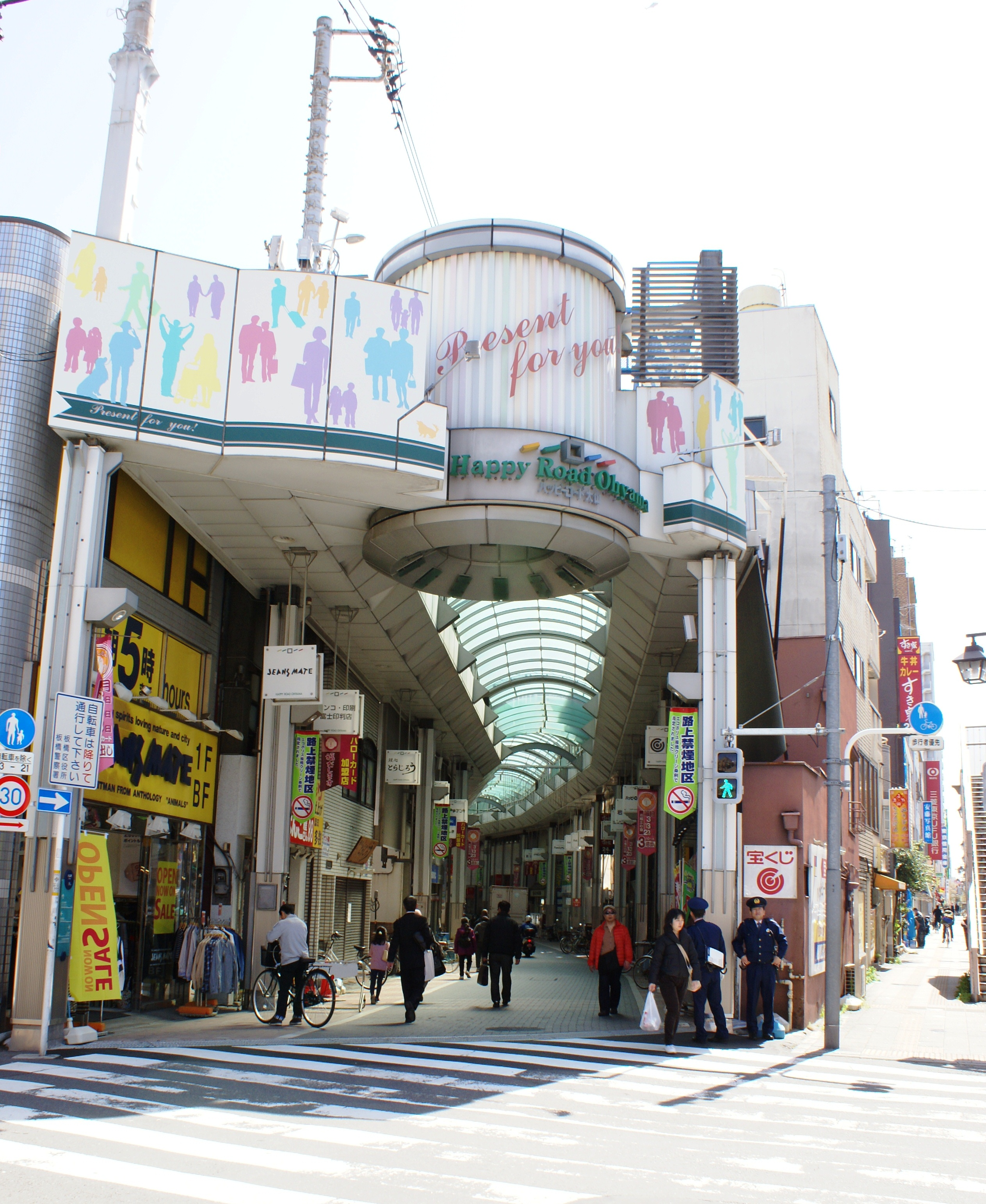 ハッピーロード大山（旧川越街道）